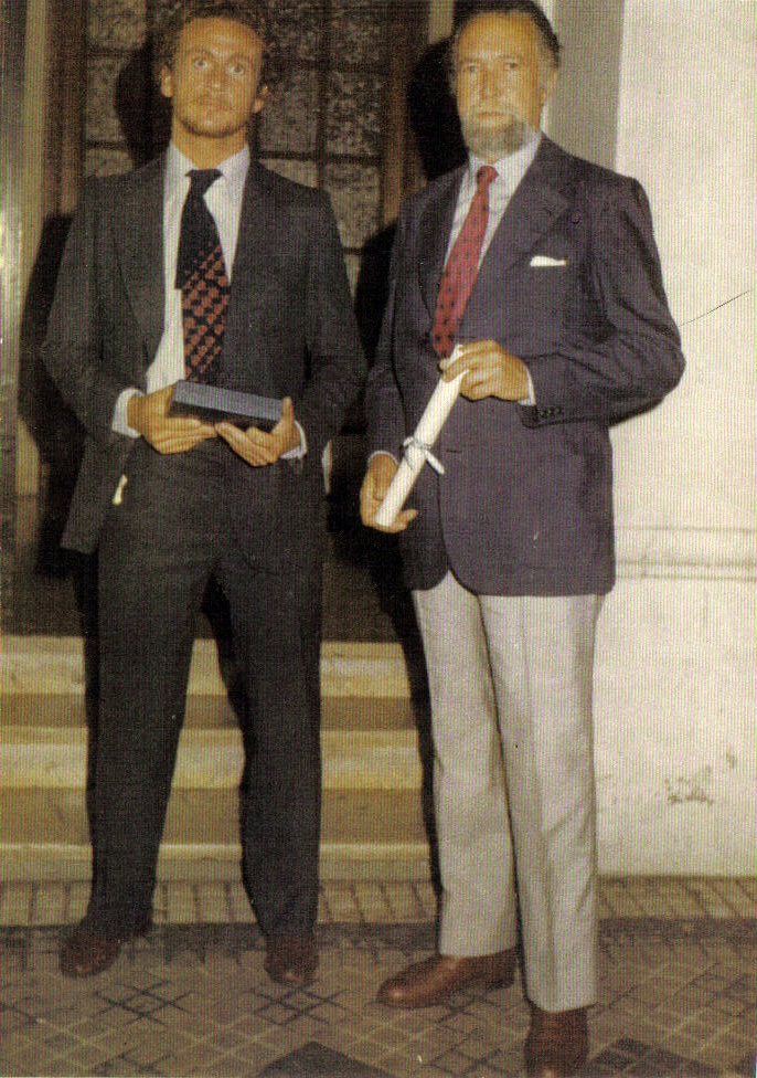 Huberto Cuevas Acevedo y su hijo luego de haber recibido el premio Francisco P. Moreno, de la Sociedad Argentina de Estudios Geográficos (GEA).